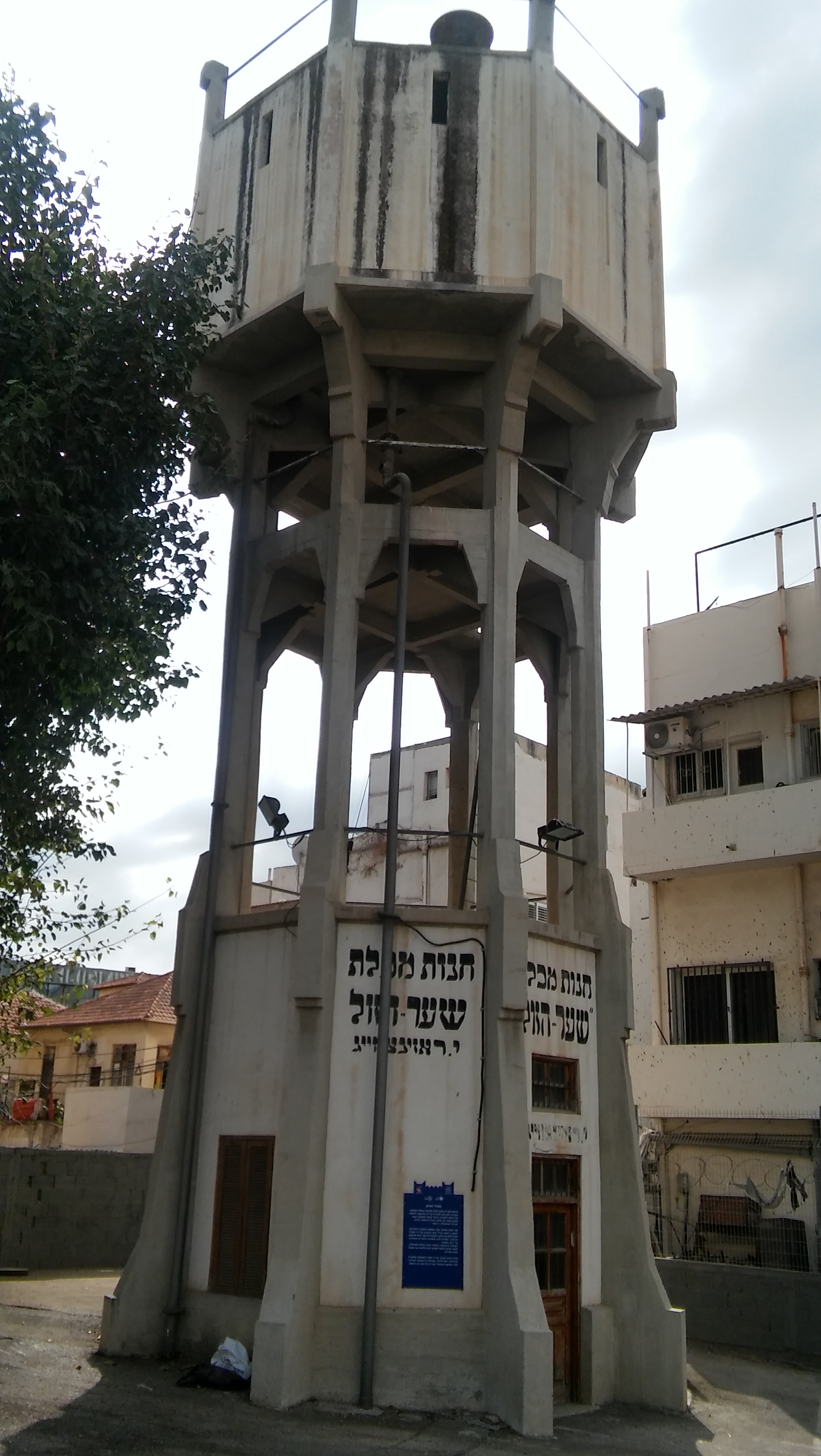 מגדל המים ברחוב החשמל